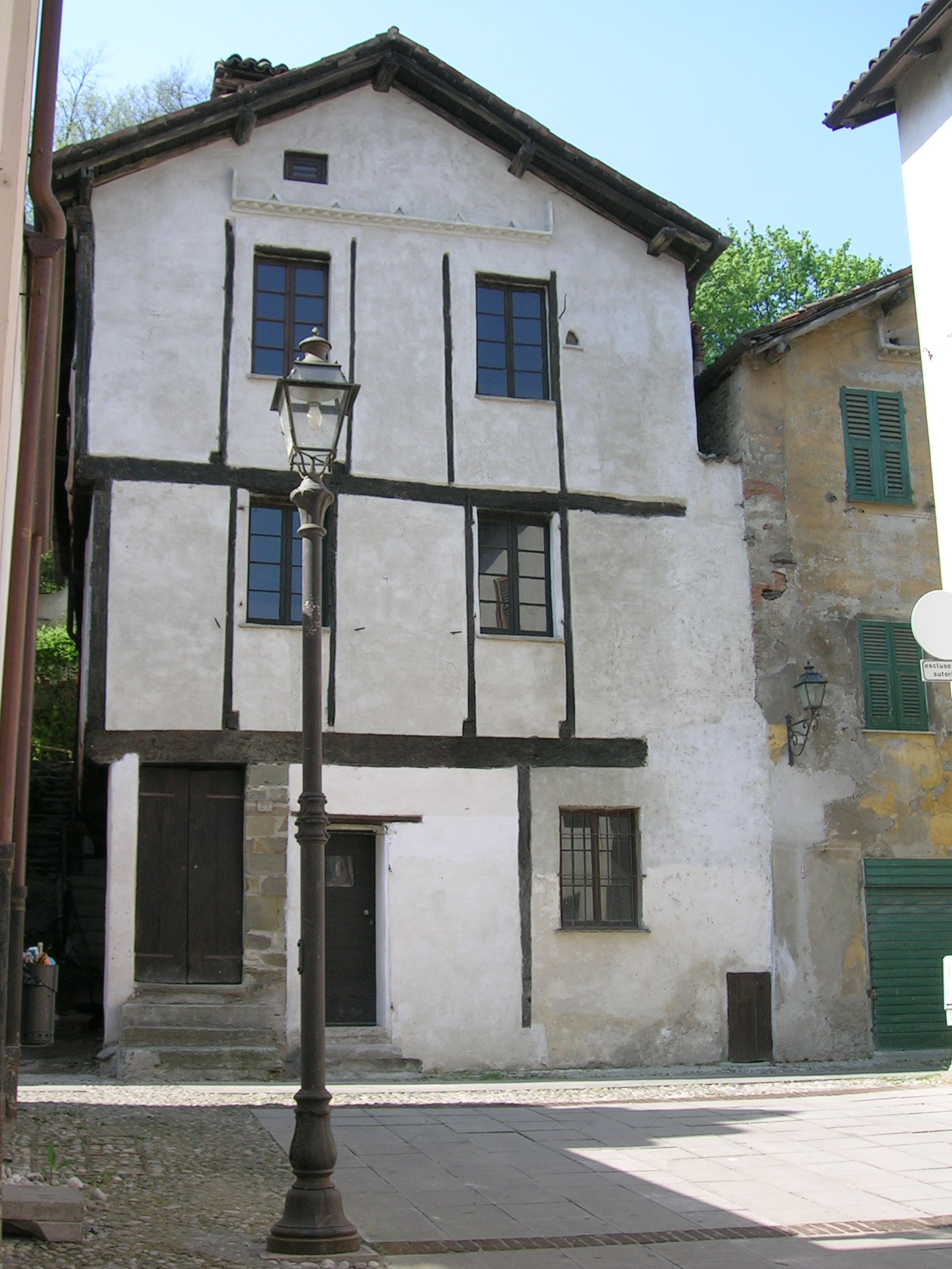 Casa Gotica di Arquata Scrivia